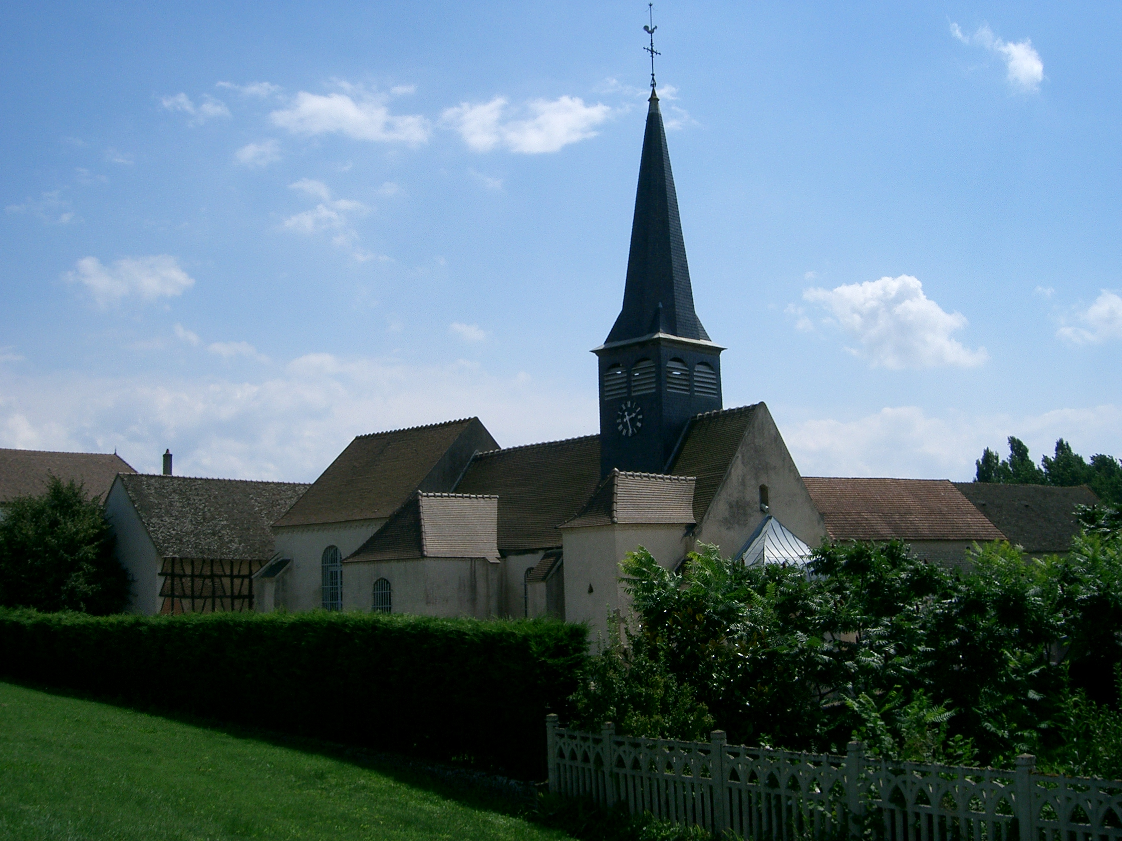 Saunières (Saône et Loire - France) - l'église